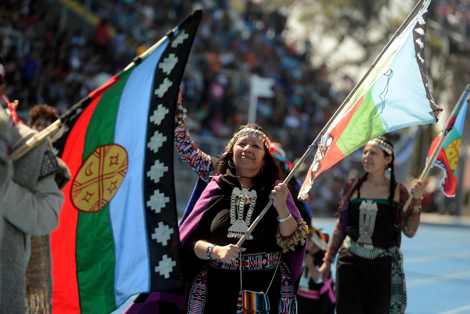 Ministro Elizalde participa de la celebración del Bicentenario de la Batalla de Rancagua